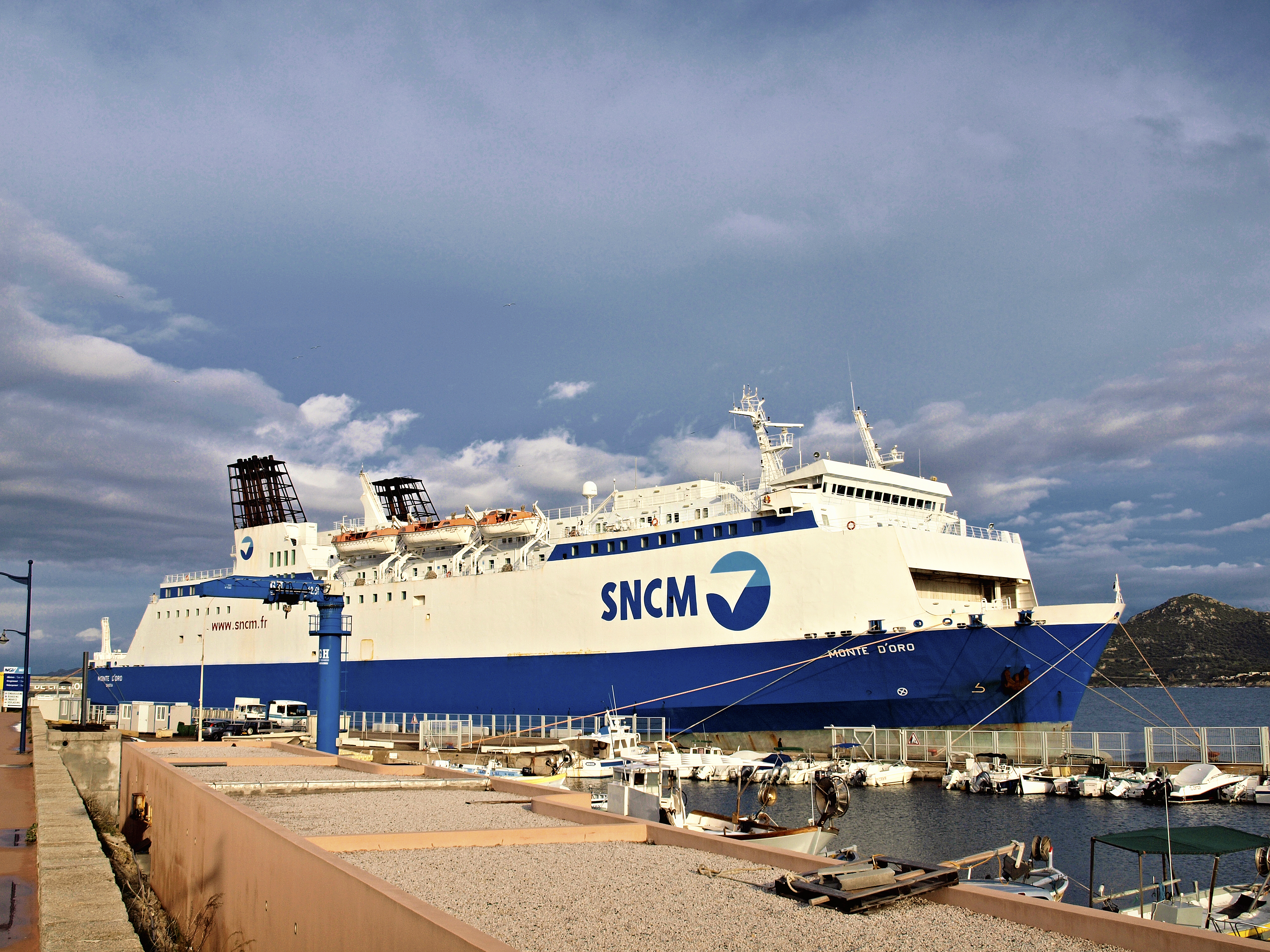 L'Île-Rousse - Le Monte d'Oro à quai